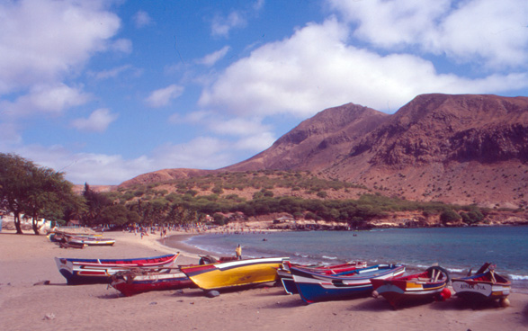 Baí­a Verde. Tarrafal. Foto de Mito. Maio de 2000.